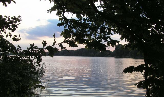 Jeden ze stawów milickich pod wieczór